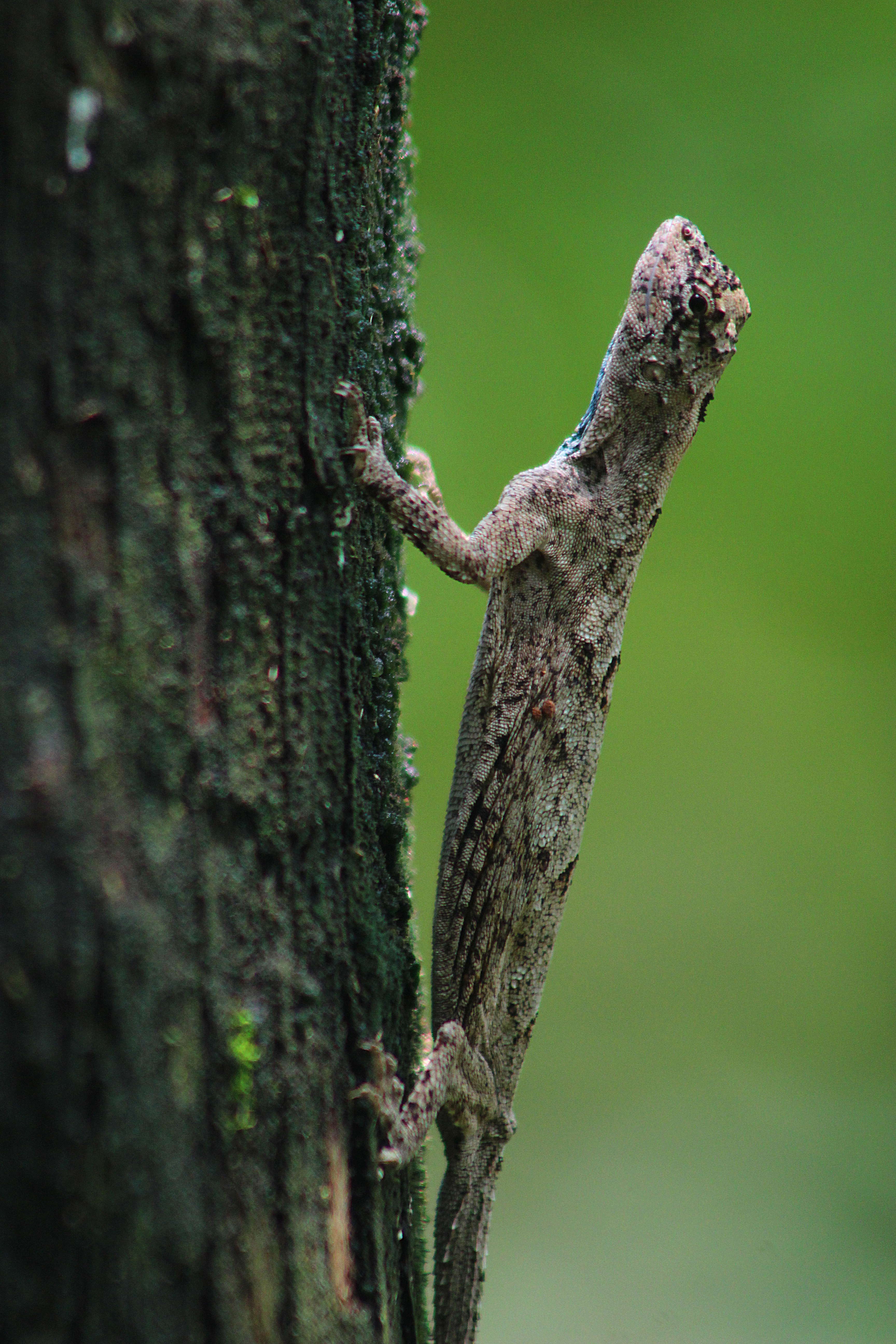 Cekiber (Draco volans) individu betina sedang mengintai mangsanya. di Jakarta, keberadaannya mulai terancam akibat konversi lahan yang merusak habitatnya.